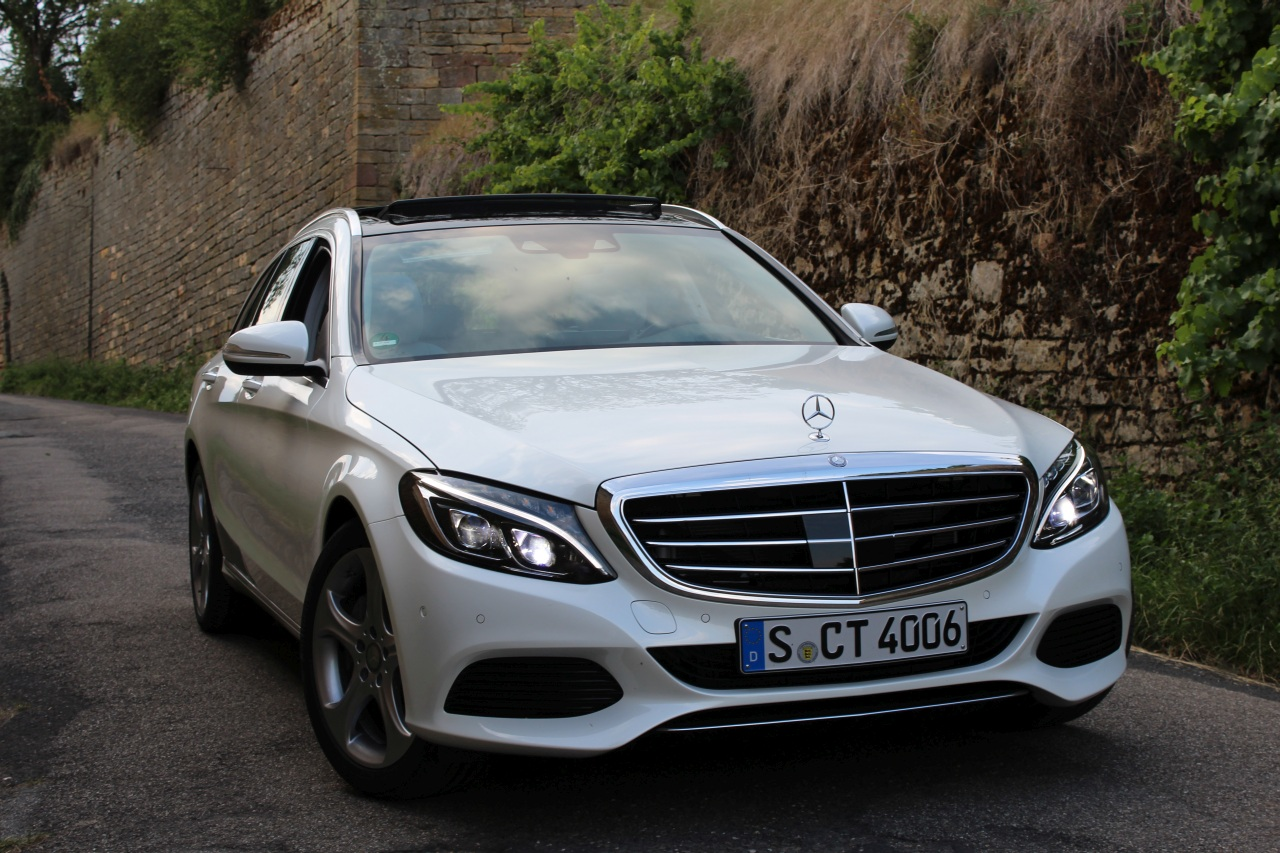 das neue T-Modell C-Klasse